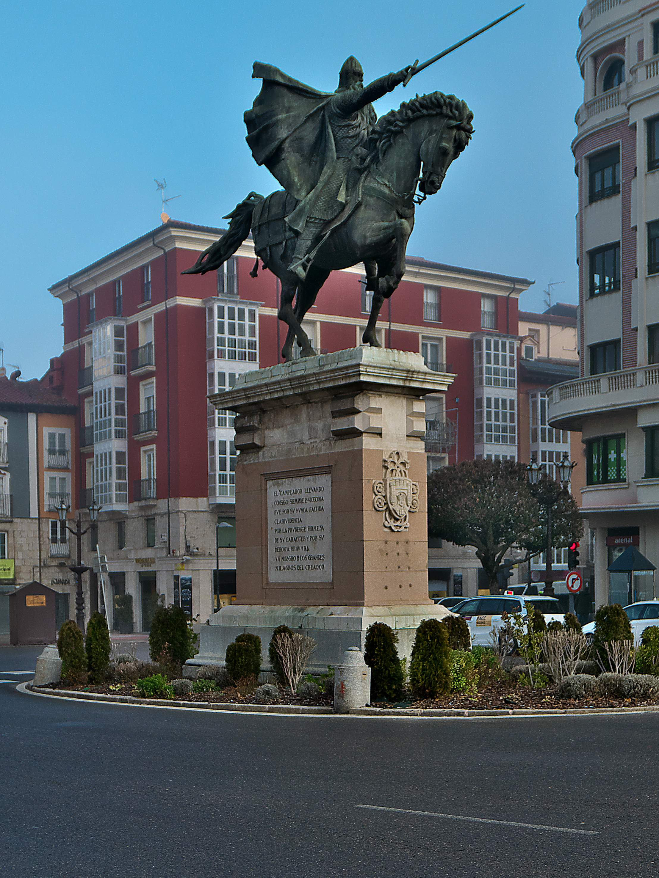 Plaza de Mio Cid, Burgos. Juan Cristóbal González Quesada presenta la escultura en bronce (1955) de Rodrigo Díaz de Vivar.